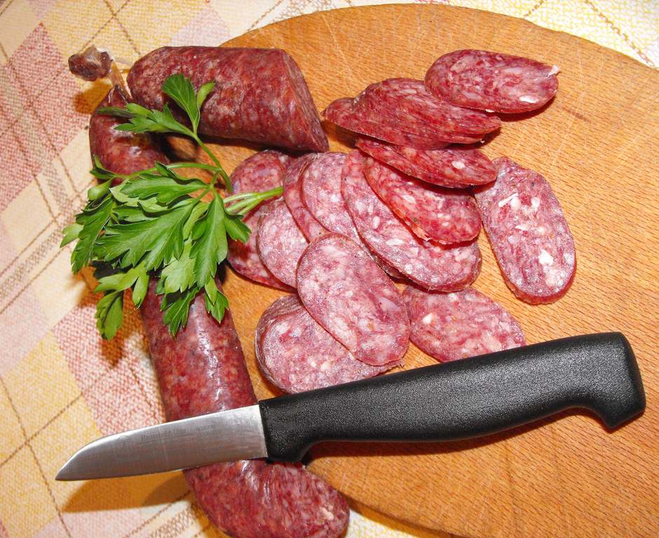 Sudjuk (Суджук)